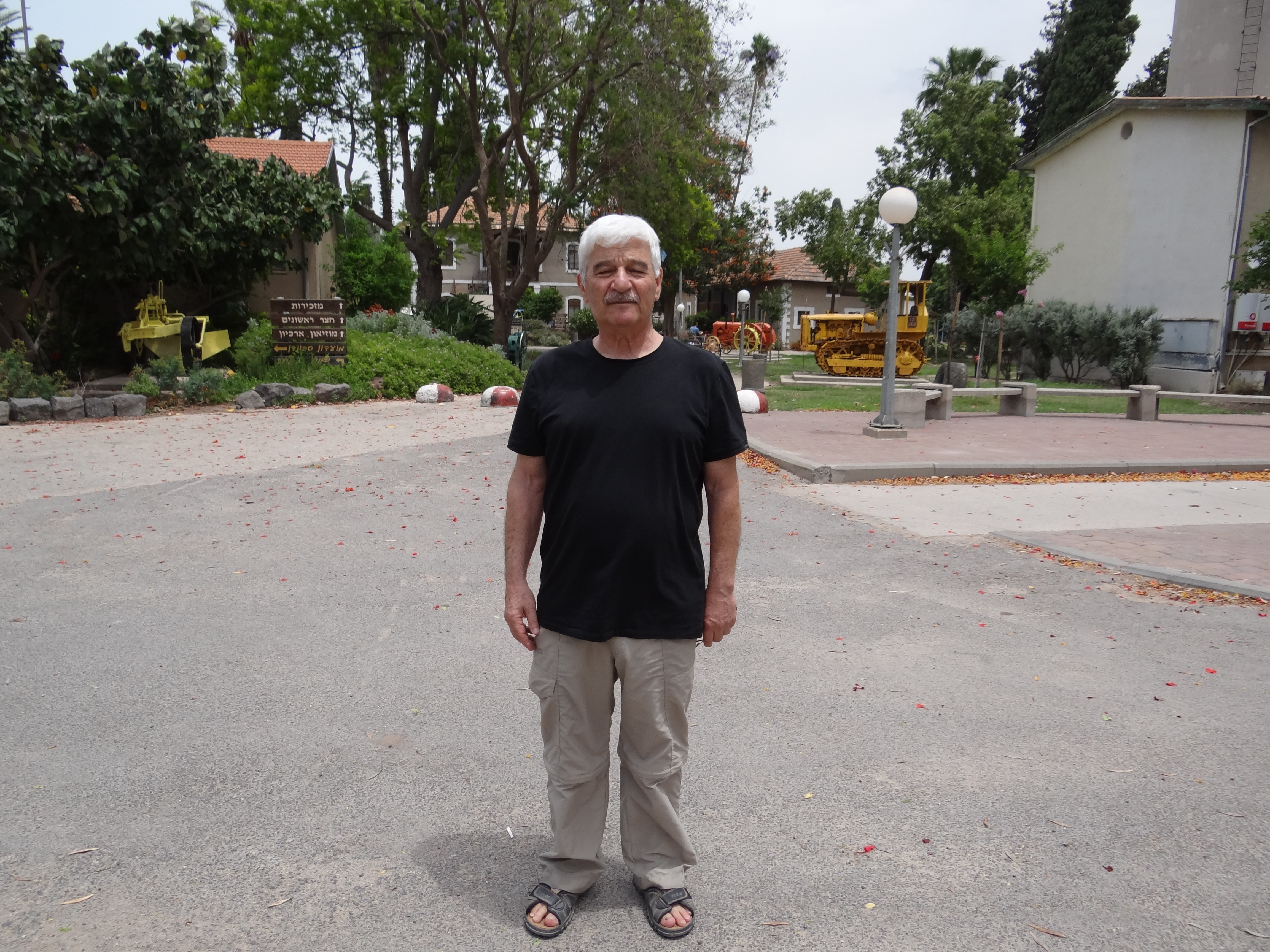 איתן פרץ הוא פזמונאי ישראלי. כתב את השיר עין גדי חבר קיבוץ דגניה א